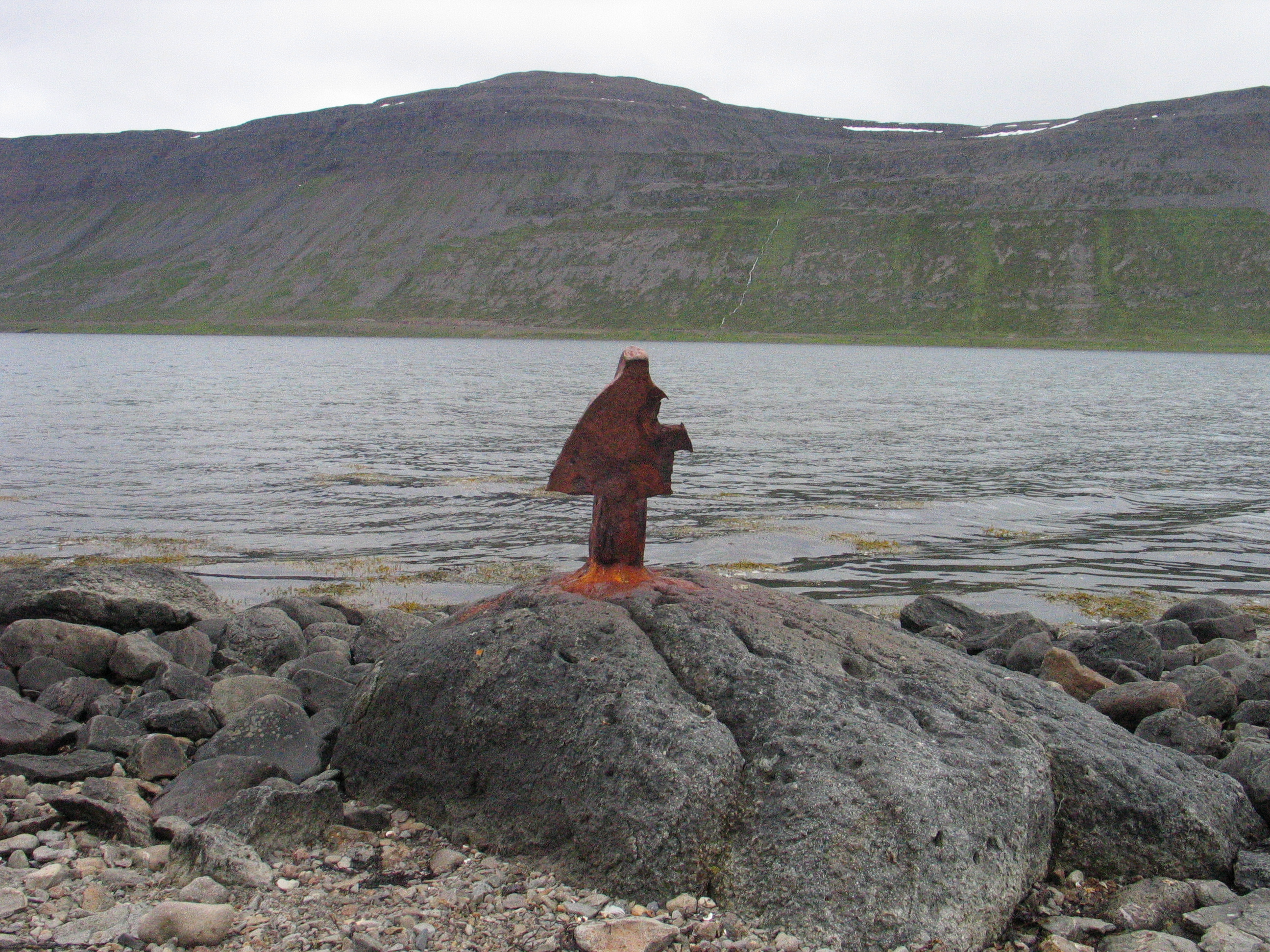 Polli eftir norska hvalveiðimenn á Dvergasteinseyri í Álftafirði.